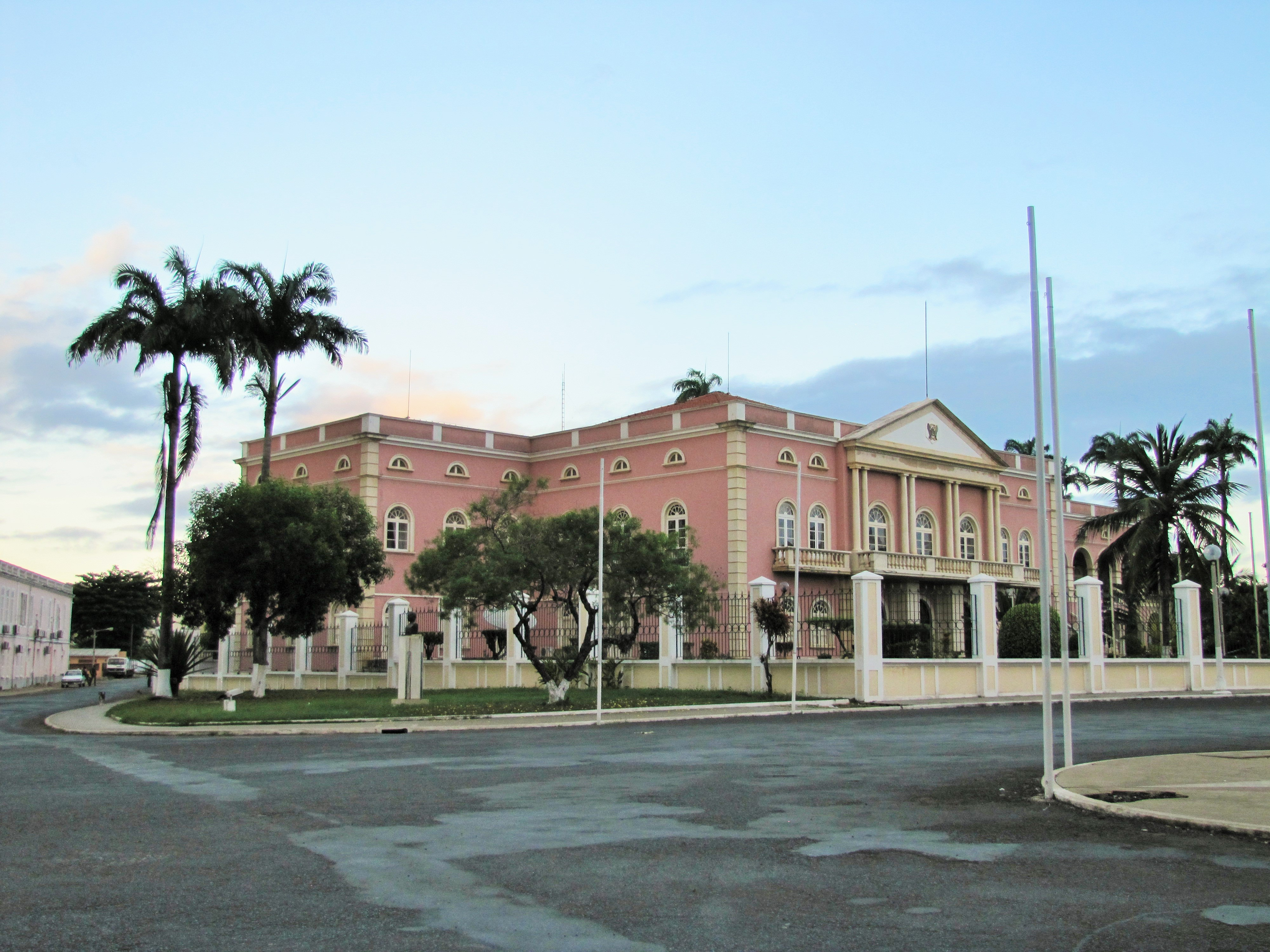 Sao Tome Presidential Palace